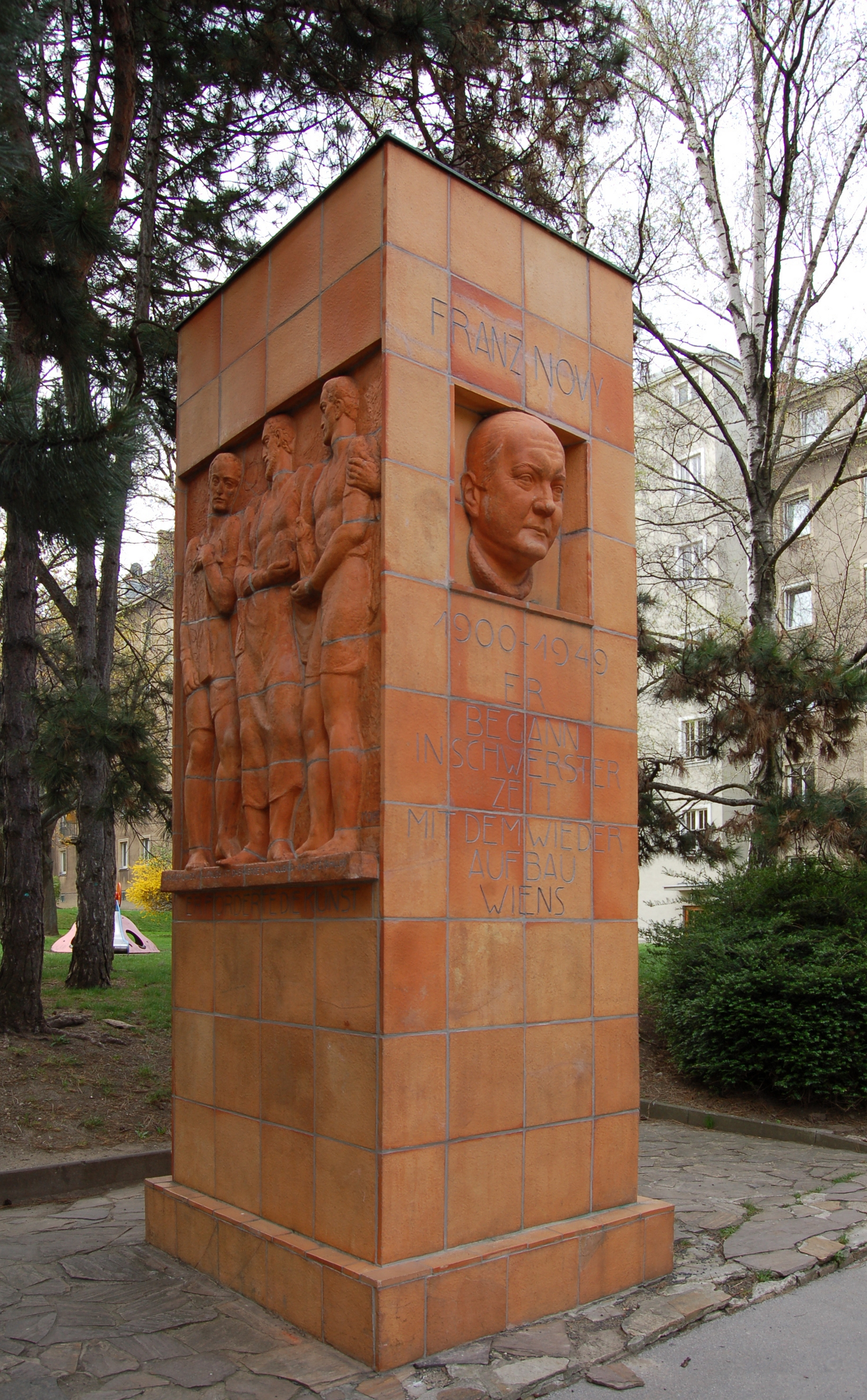 Das Franz-Novy-Denkmal im Franz-Novy-Hof in Wien Ottakring (Koppstraße 97-101).